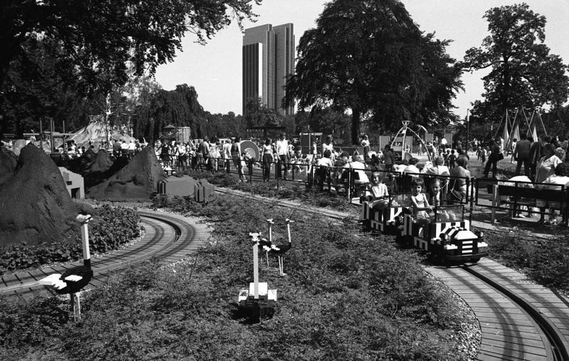 St.S. Hans Jürgen Rohr besucht die Internationale Gartenbau Ausstellung (IGA) in Hamburg